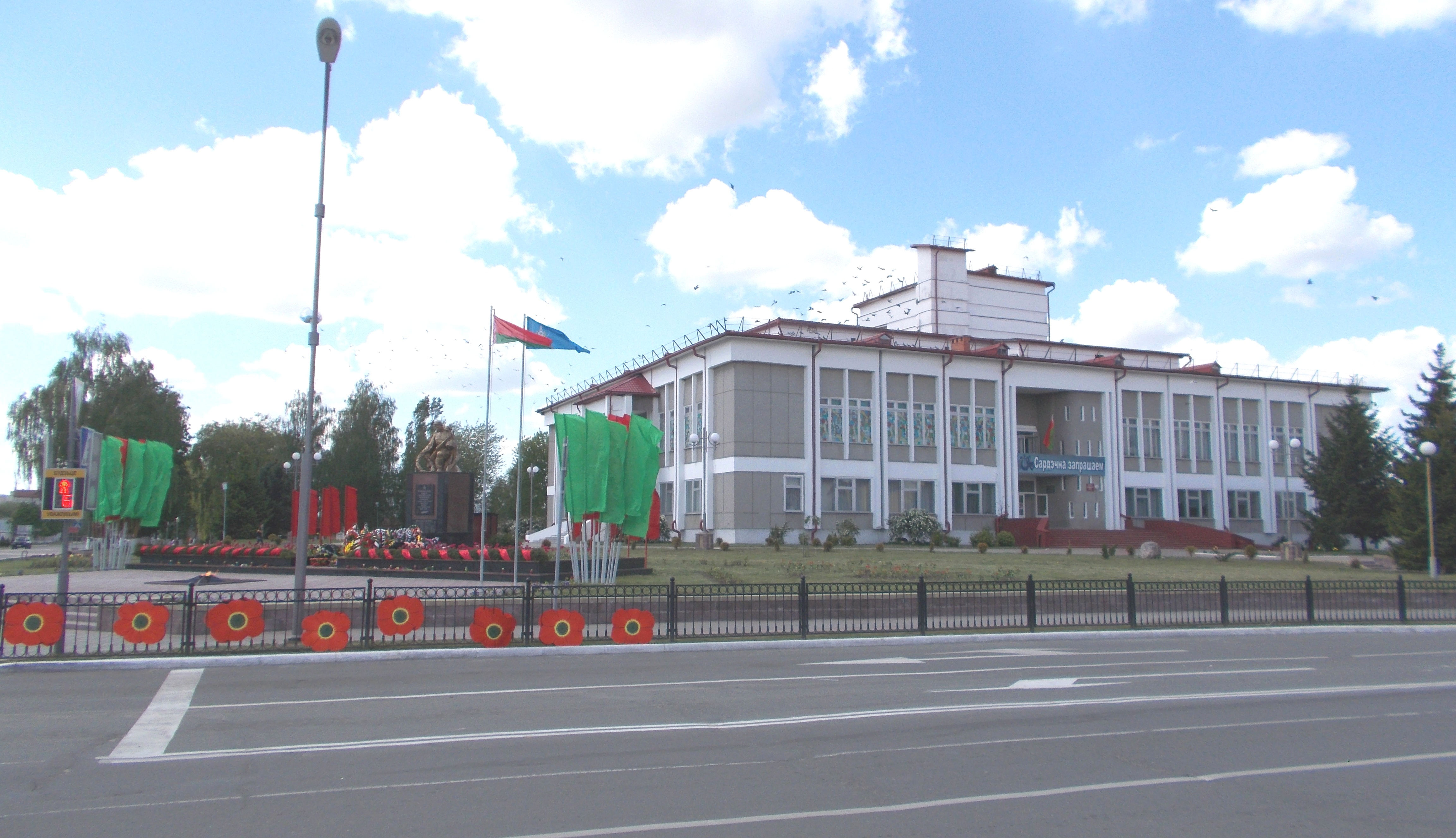 Гетто в Иваново было организовано нацистами в центре местечка и занимало квартал, ограниченный Базарной площадью, улицей Советской и мельницей (сейчас - улицы Советская и Красных партизан). На фотографии - это квартал за зданием Дома культуры (площадь Октября, 2).